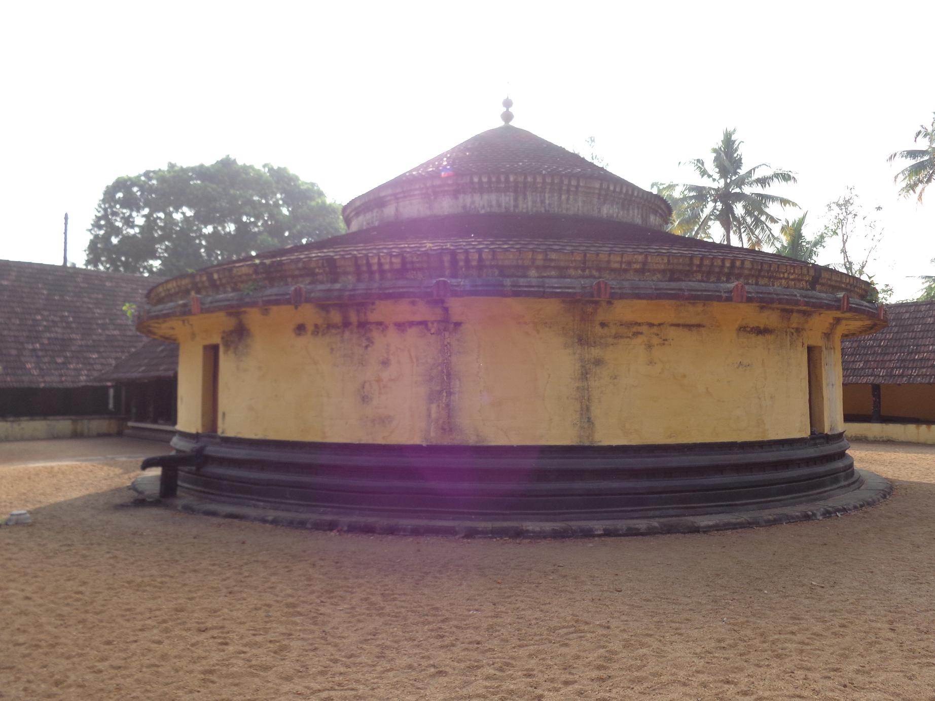 തൃച്ചിറ്റാറ്റ് ക്ഷേത്രത്തിലെ ശ്രീകോവിൽ.